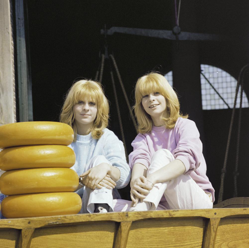 Het Franse duo Sophie & Magaly, dat Luxemburg vertegenwoordigde, tijdens een fotosessie voor het Eurovisie Songfestival 1980